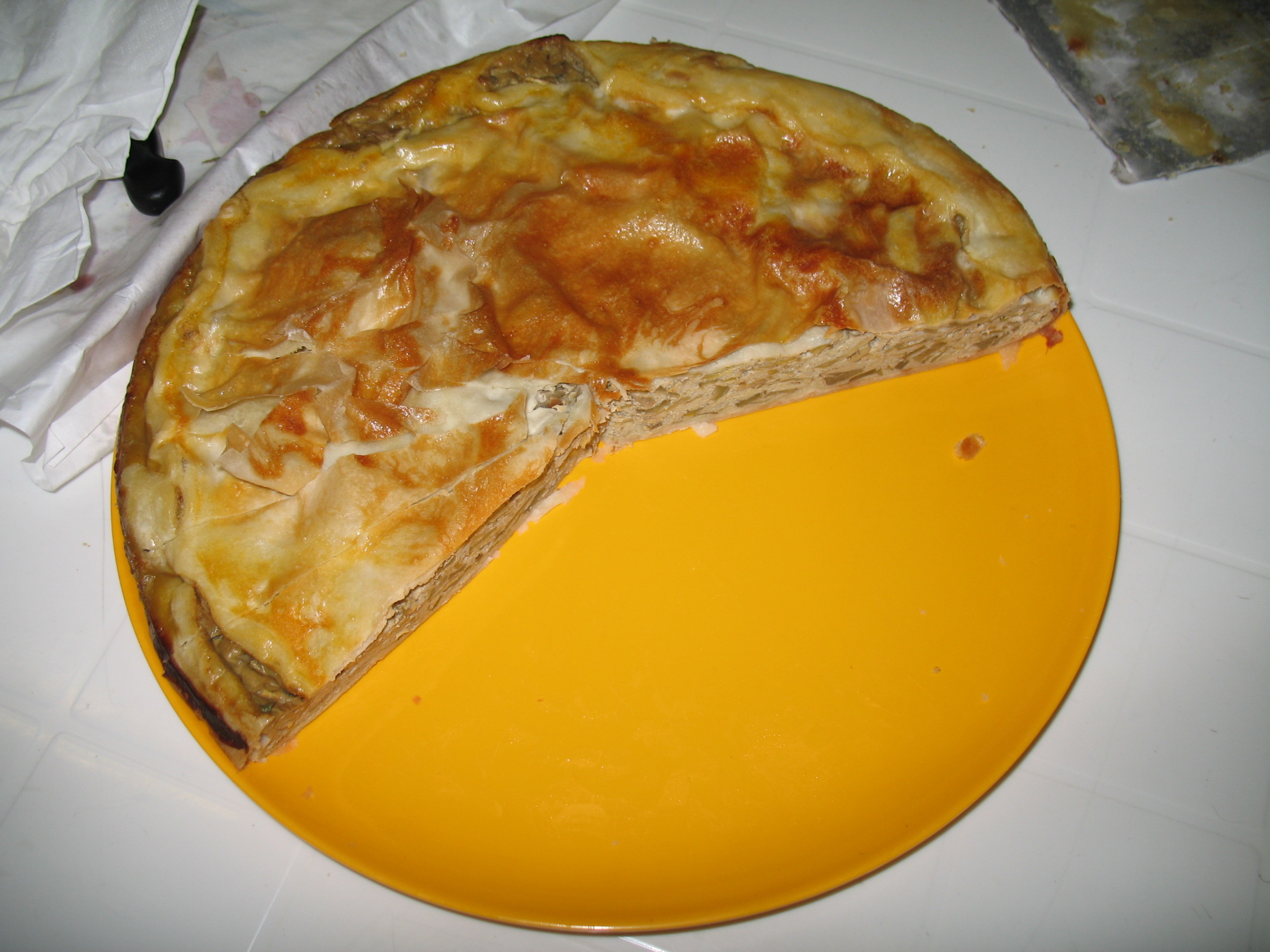 Immagine da Genova - wikiraduno del 7 gennaio 2007 - la torta pasqualina fornita da donPaolo già abbondantemente sbocconcellata ...